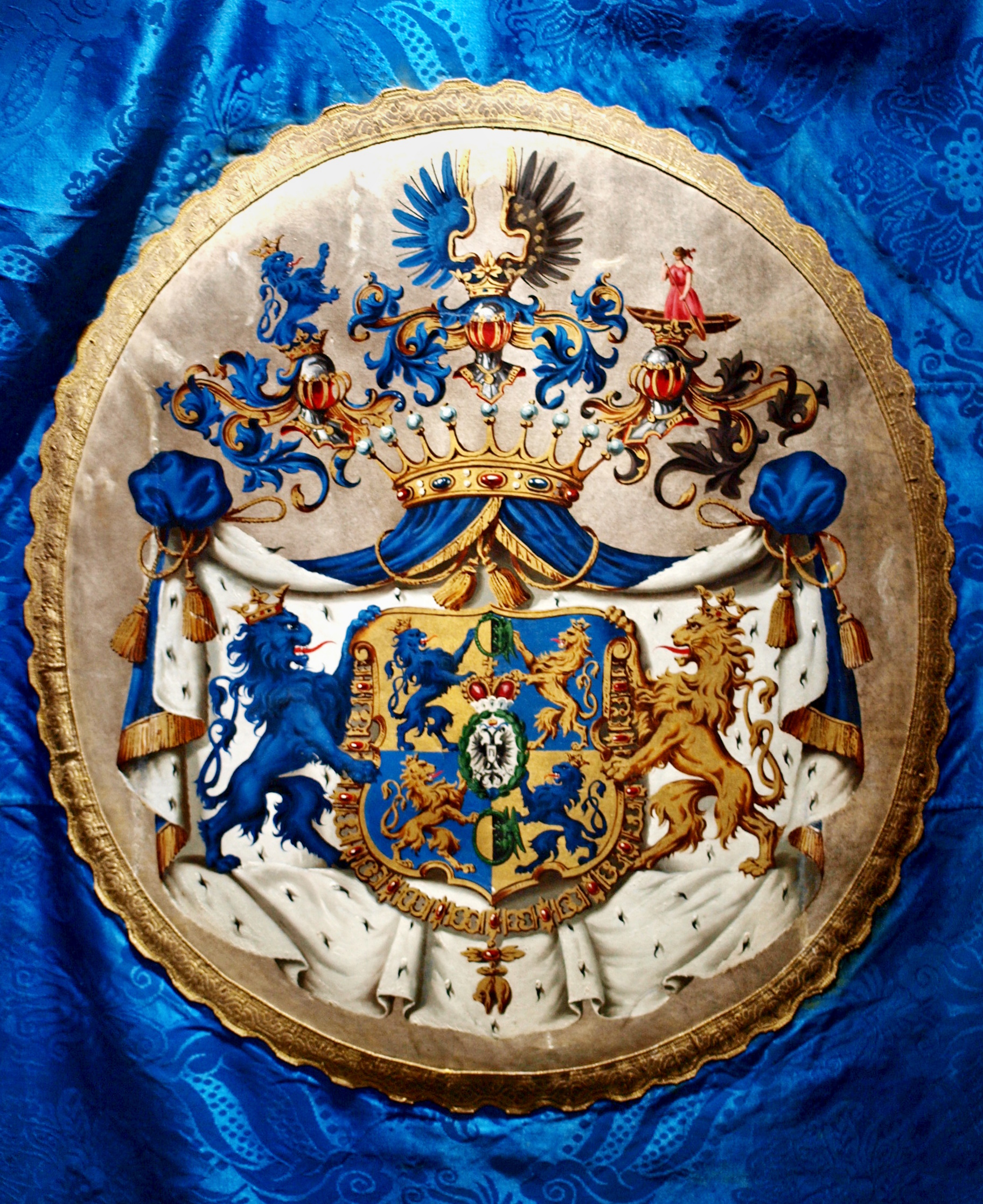 Velký znak Valdštejnů vyšívaný